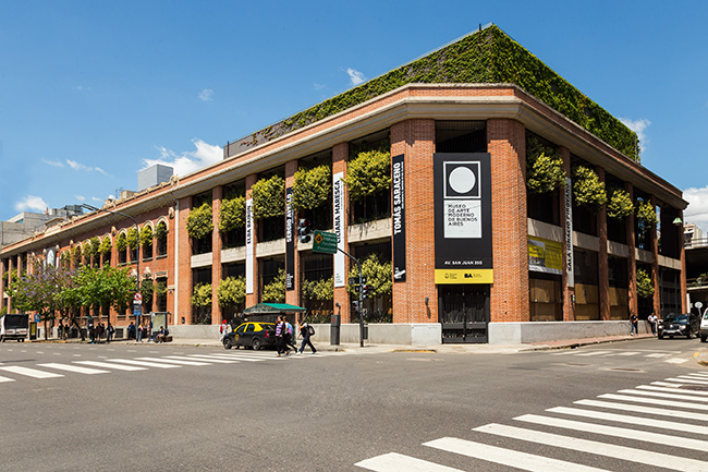 Foto de la fachada del Museo de Arte Moderno de Buenos Aires